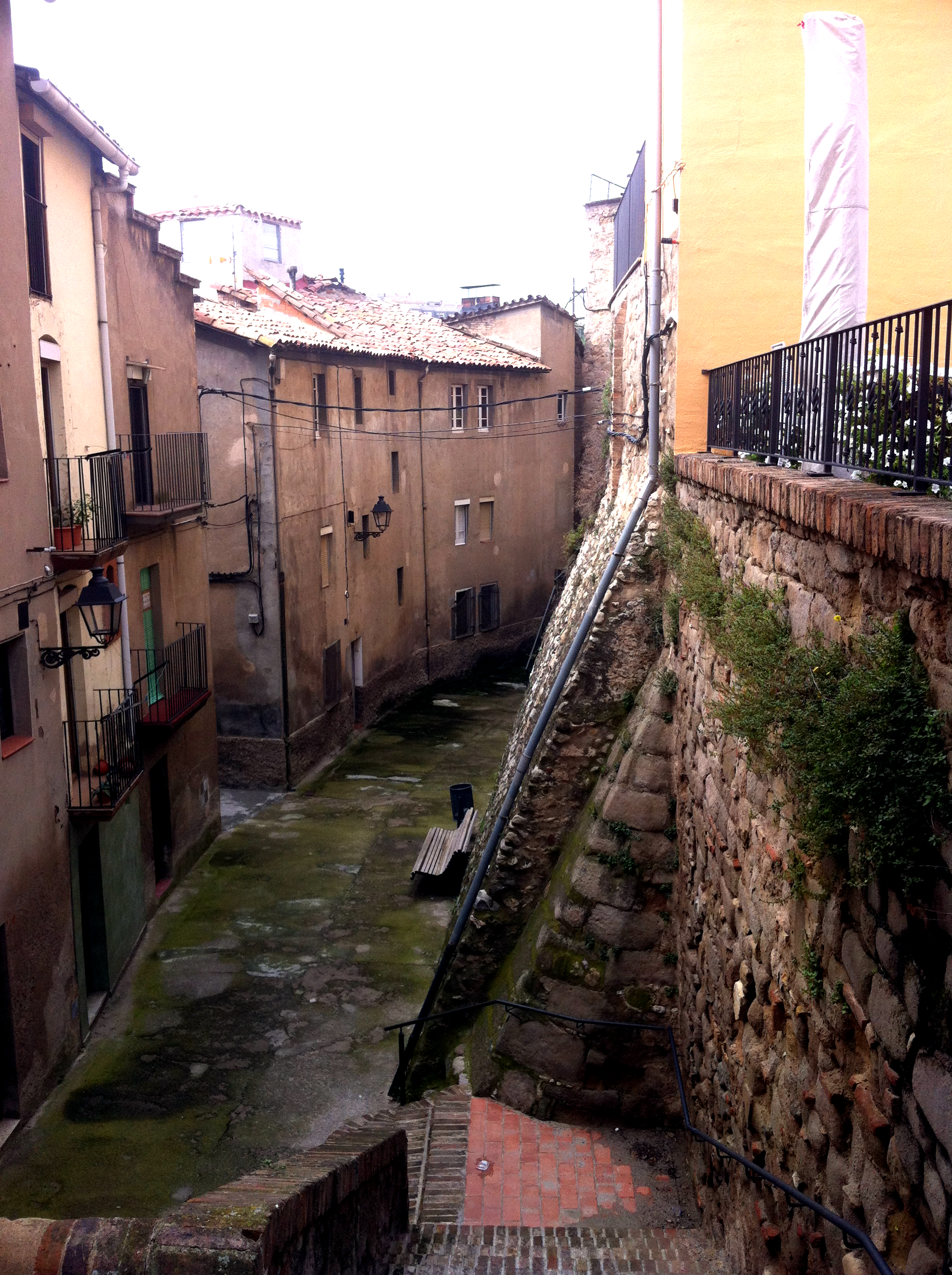 Muralla del castell de Gironella des de les escales davant l'església vella darrera l'ajuntament